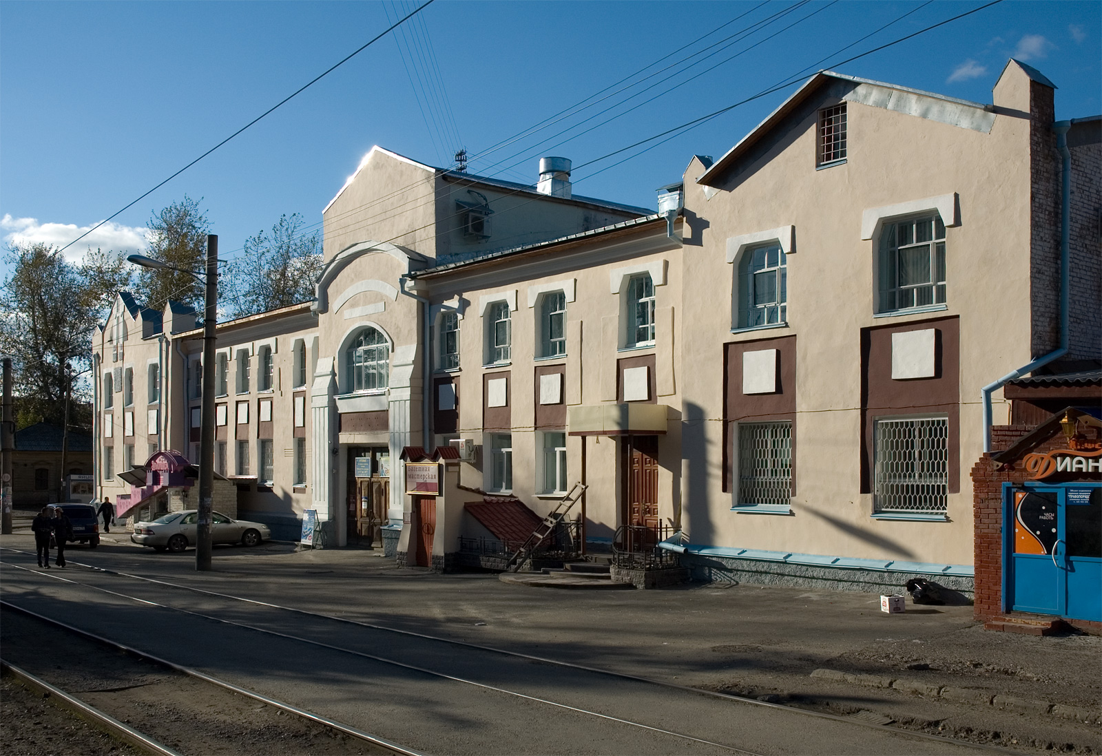 бани Громова в Томске